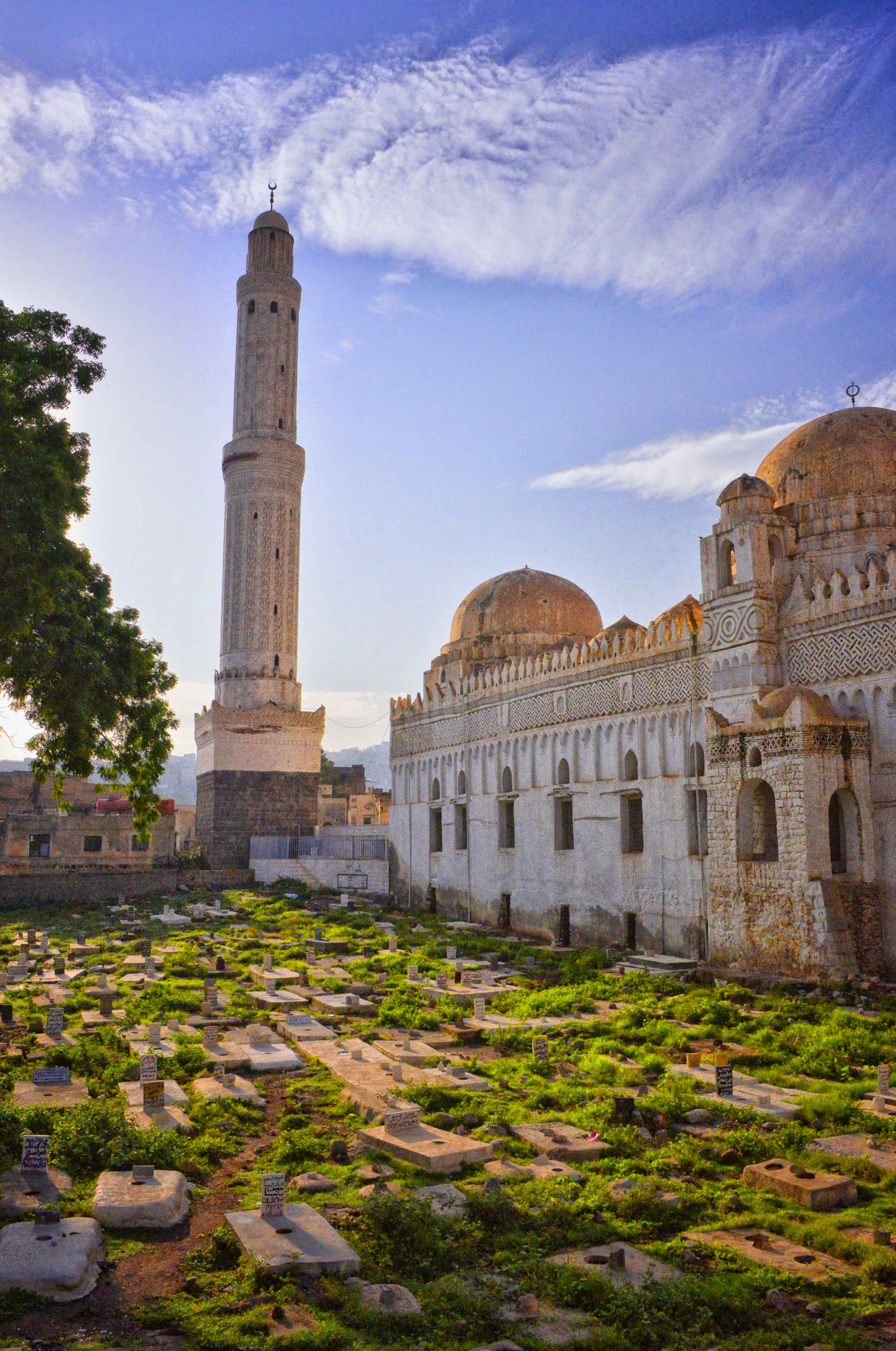 Yemen